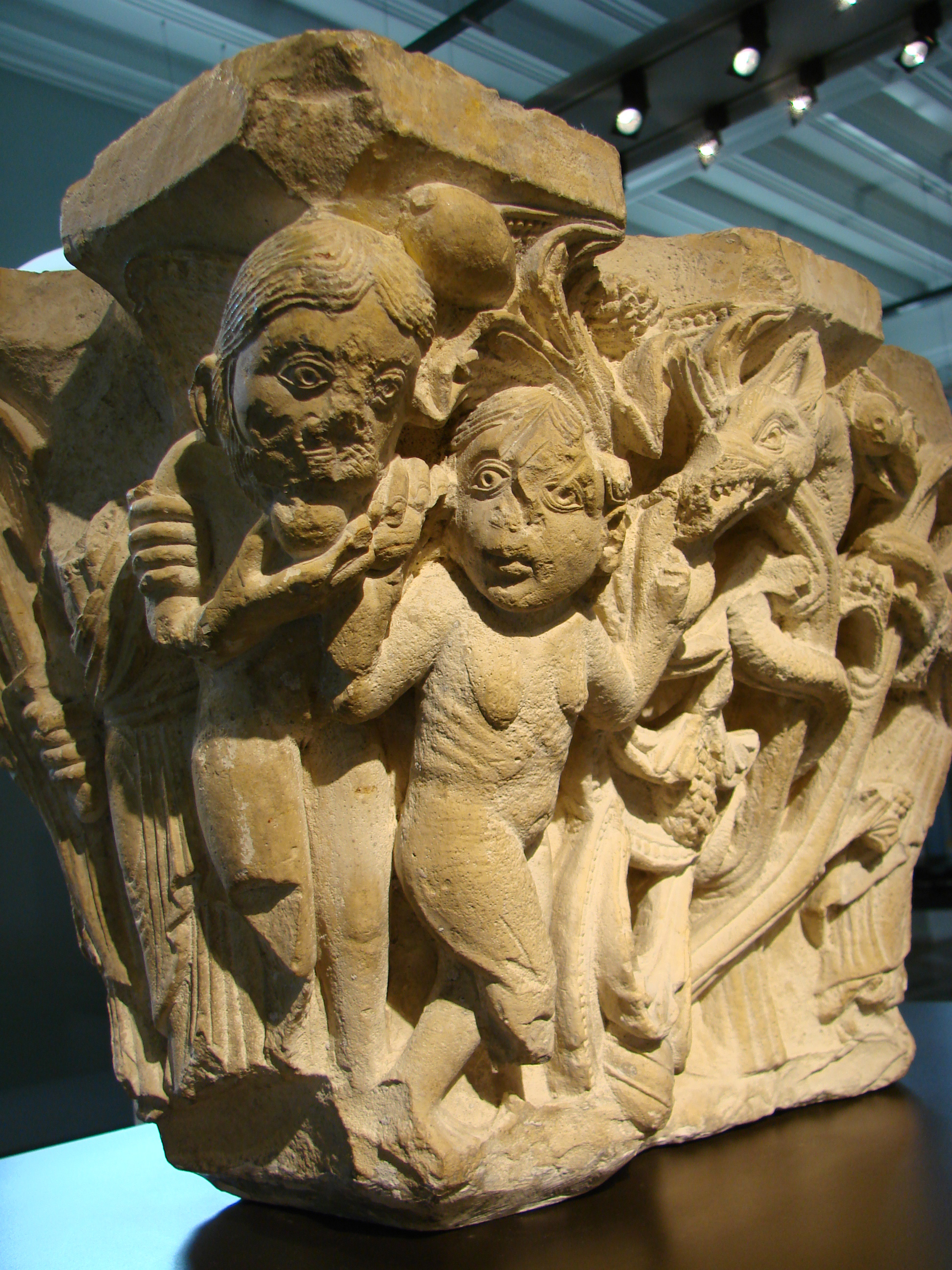 Adam et Eve, chapiteau provenant de l'ancienne abbaye de Corbie en Picardie, fin 12ème siècle. Musée de Picardie à Amiens.